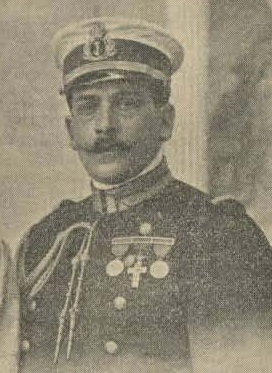 José Luís Hernandez-Pinzon Ganzinotto